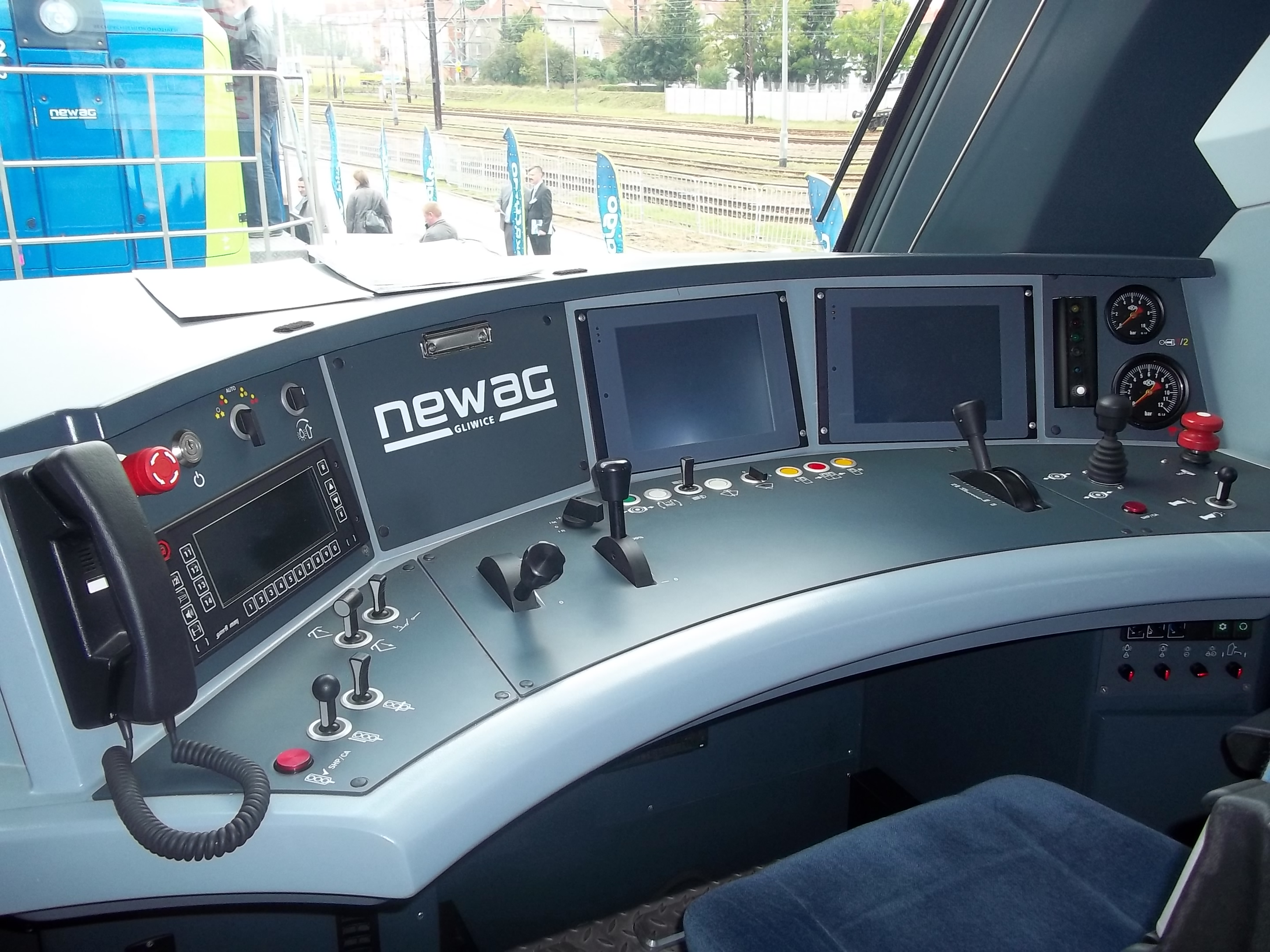 Czteroosiowa lokomotywa elektryczna Newag E4MSU-001 "Griffin" - wnętrze kabiny.